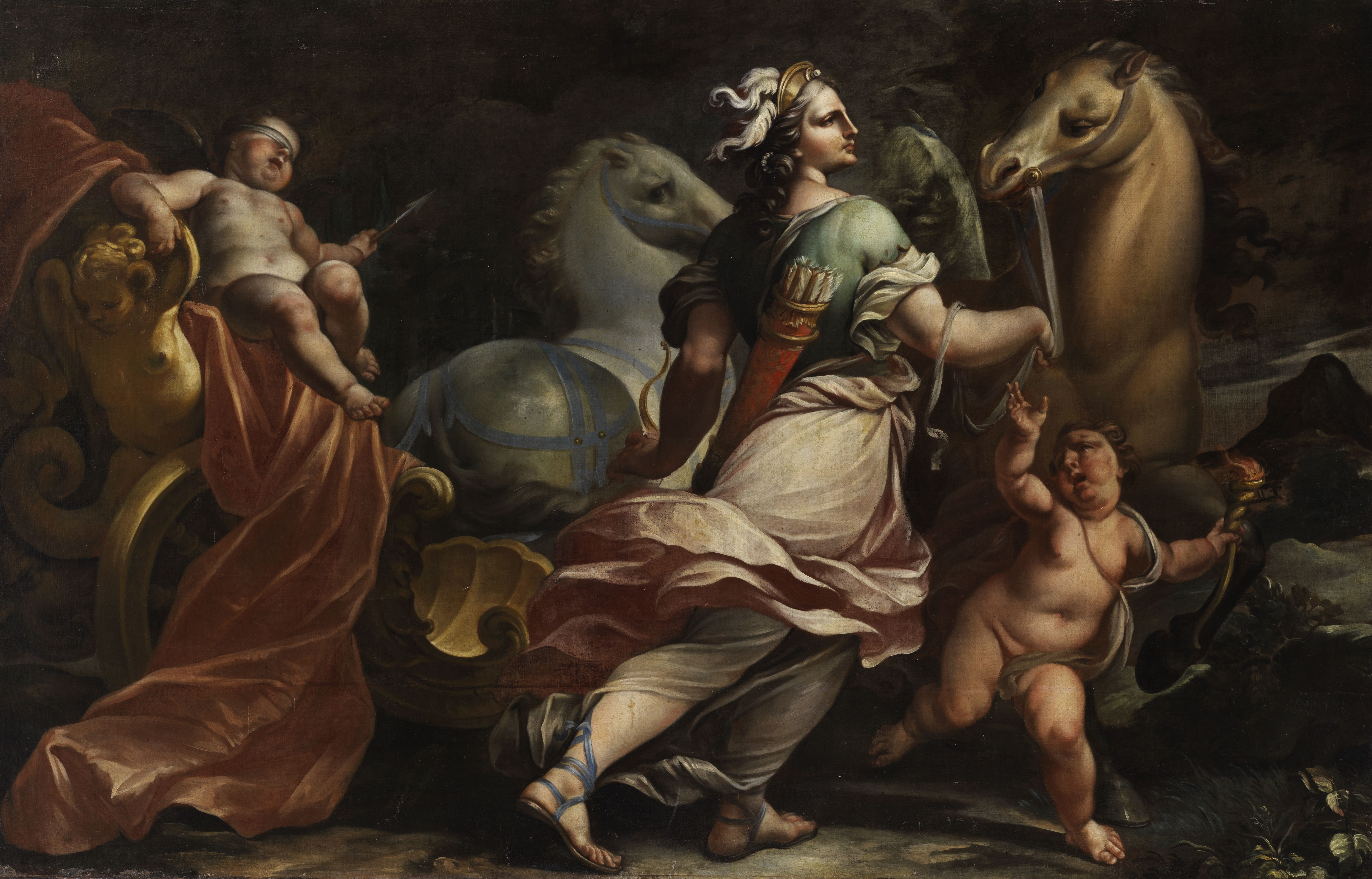 Bellona bemächtigts sich der Waffen Amors. Öl auf Leinwand. 127 x 198 cm. Rechts unten eine erkennbare Signatur „Marché“.